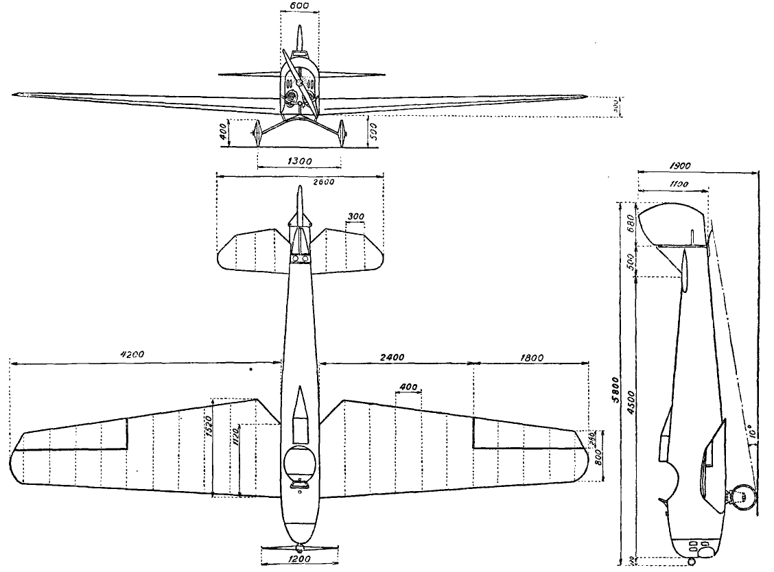 Общий вид авиетки «Буревестник С 4» с мотором Блекборн 20 HP, конструкции инженера В. П. Невдачина.